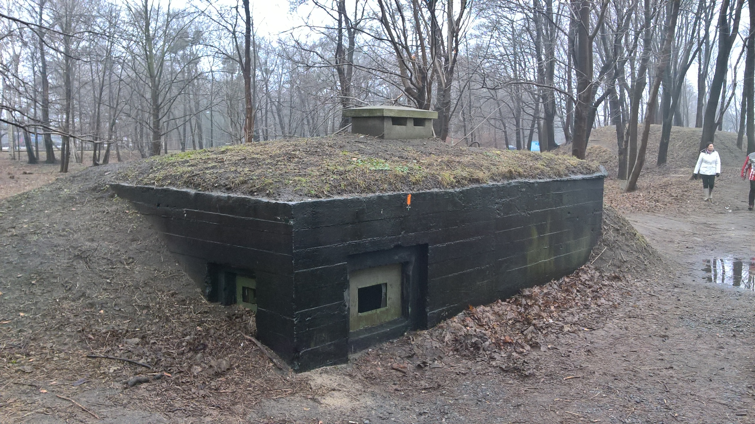 Schron bojowy Polskiej Składnicy Tranzytowej na Westerplatte.